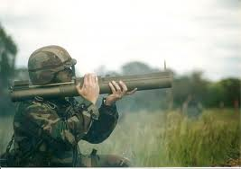 es un misil